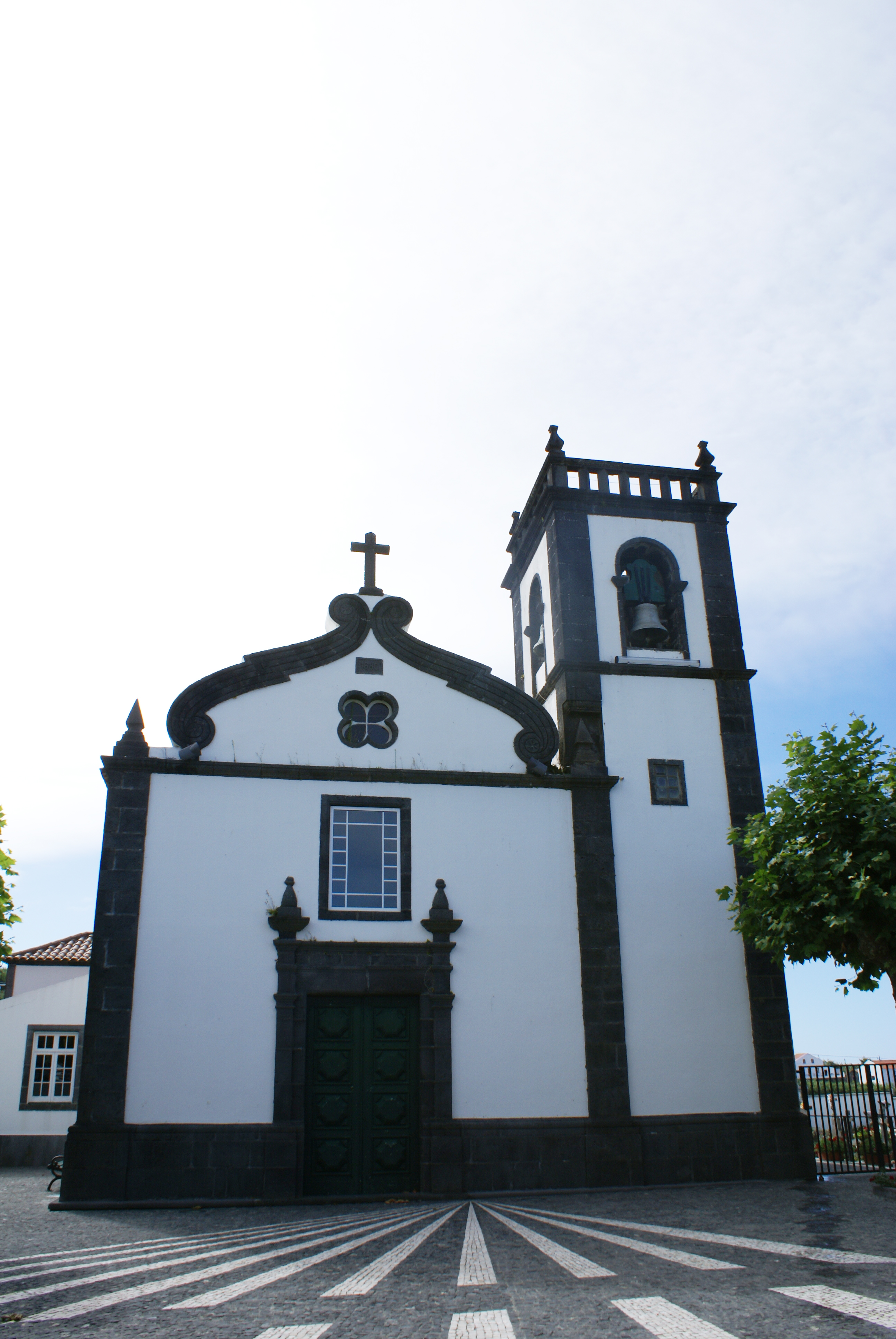 Igreja de Nossa Senhora do Pilar, Pilar da Bretanha, ilha de São Miguel, Açores